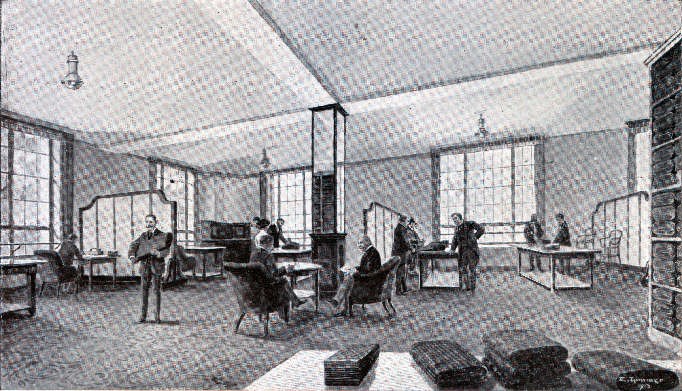 Rudolph Hertzog, Agenda 1914. Jahreskalender des Berliner Kaufhauses Rudolph Hertzog: Gros-Verkaufsraum, II. Stock an der Brüderstraße.